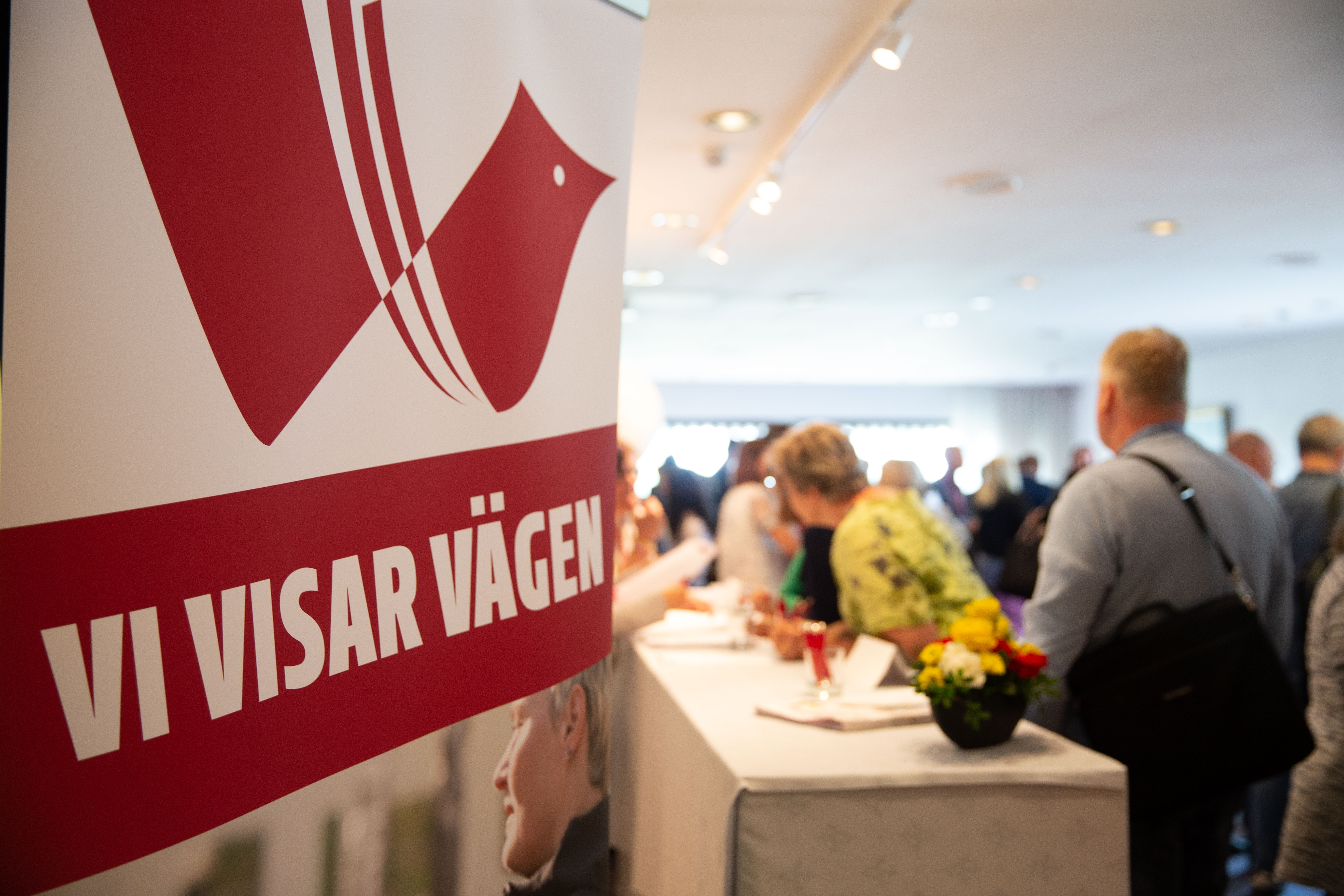 Förbundskongress 2018